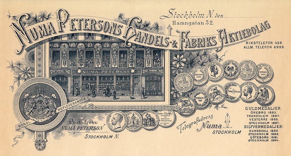 Numa Petersons handelsbolag, brevhuvudet